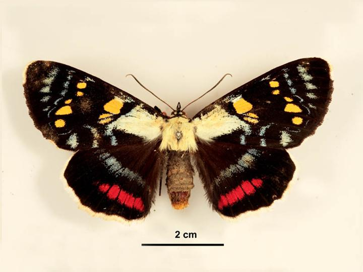 Agarista agricola female, dorsal view